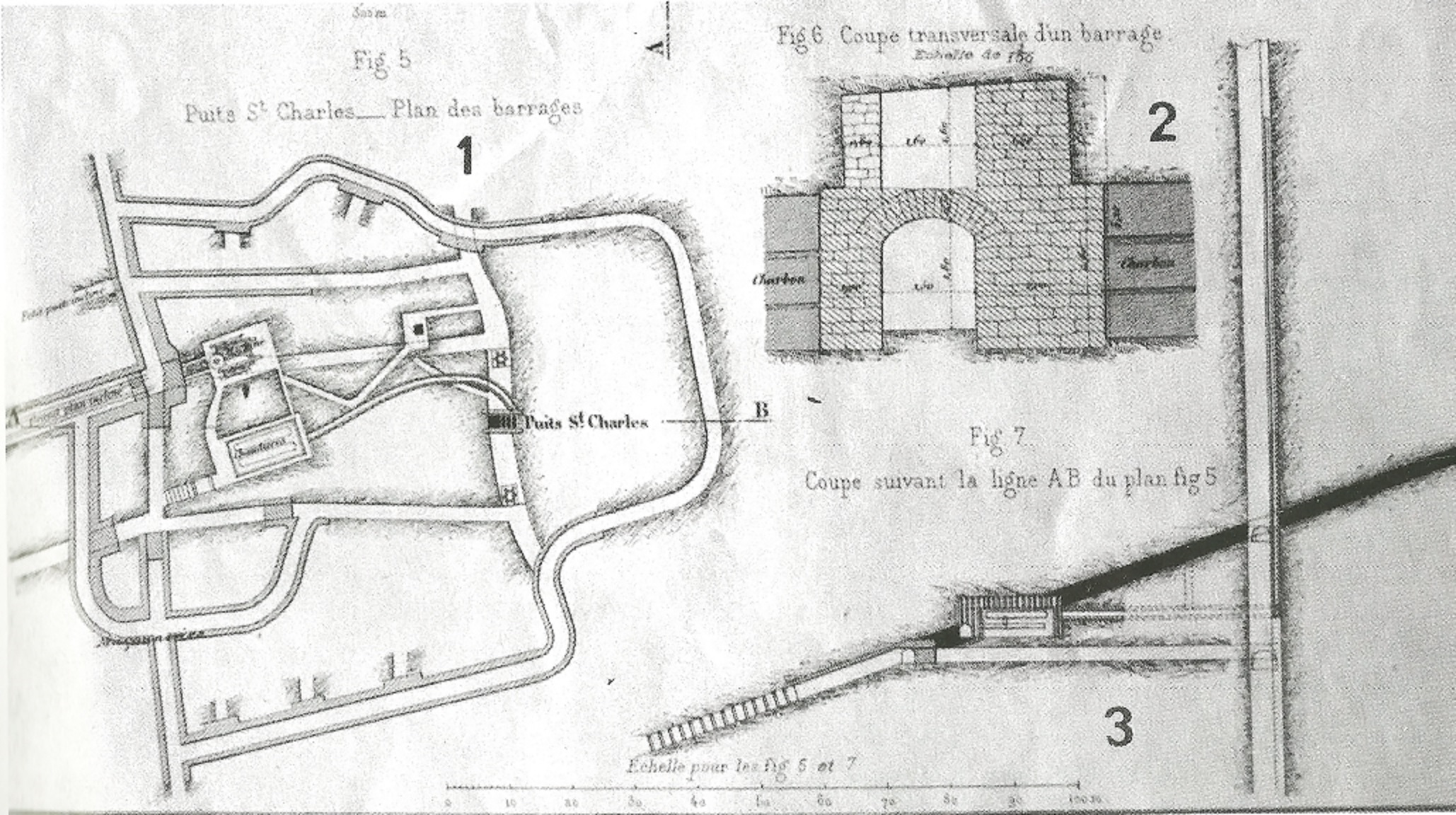 La machine à tacquet du puits saint-Charles (houillères de Ronchamp).